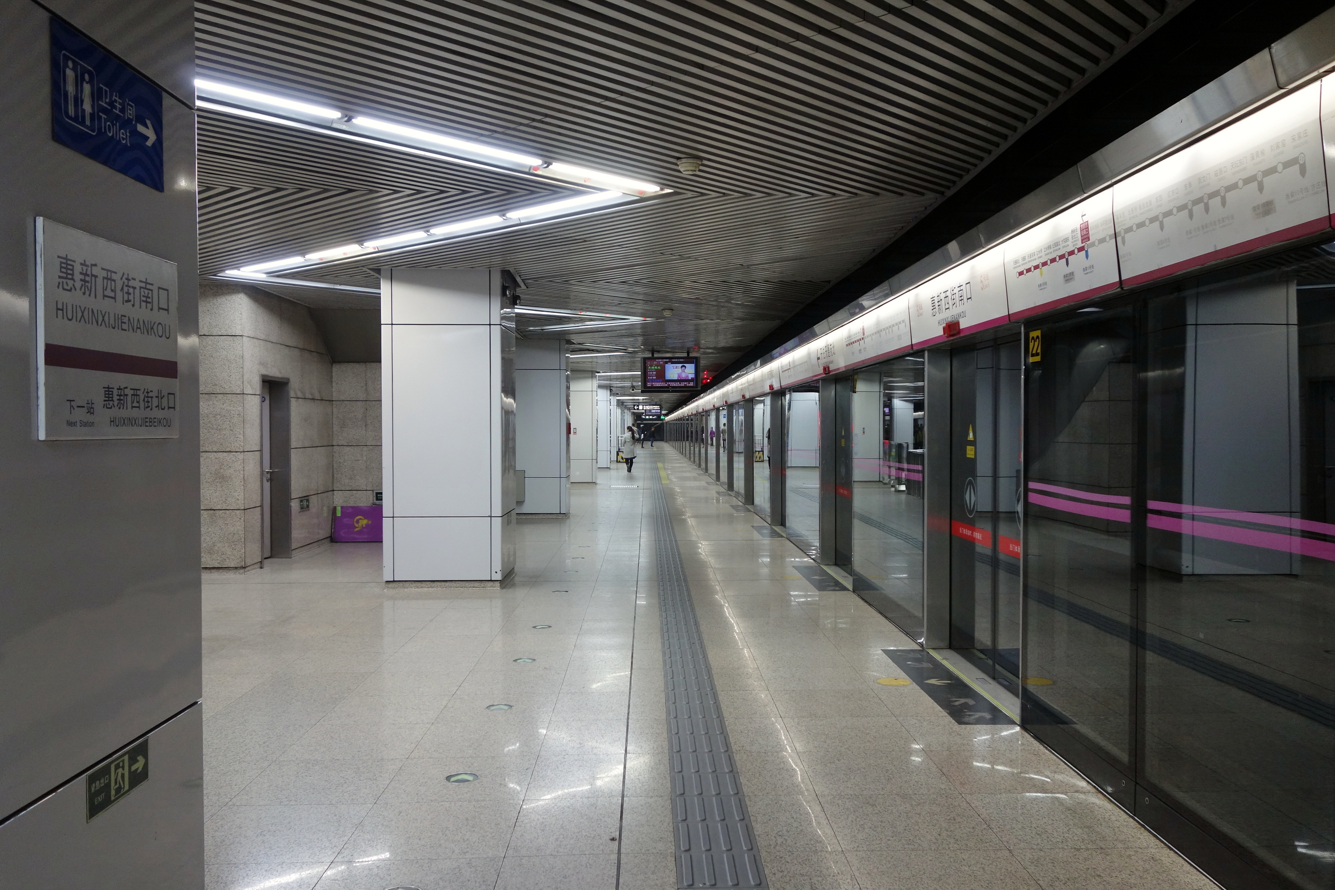 北京地铁5号线惠新西街南口站站台